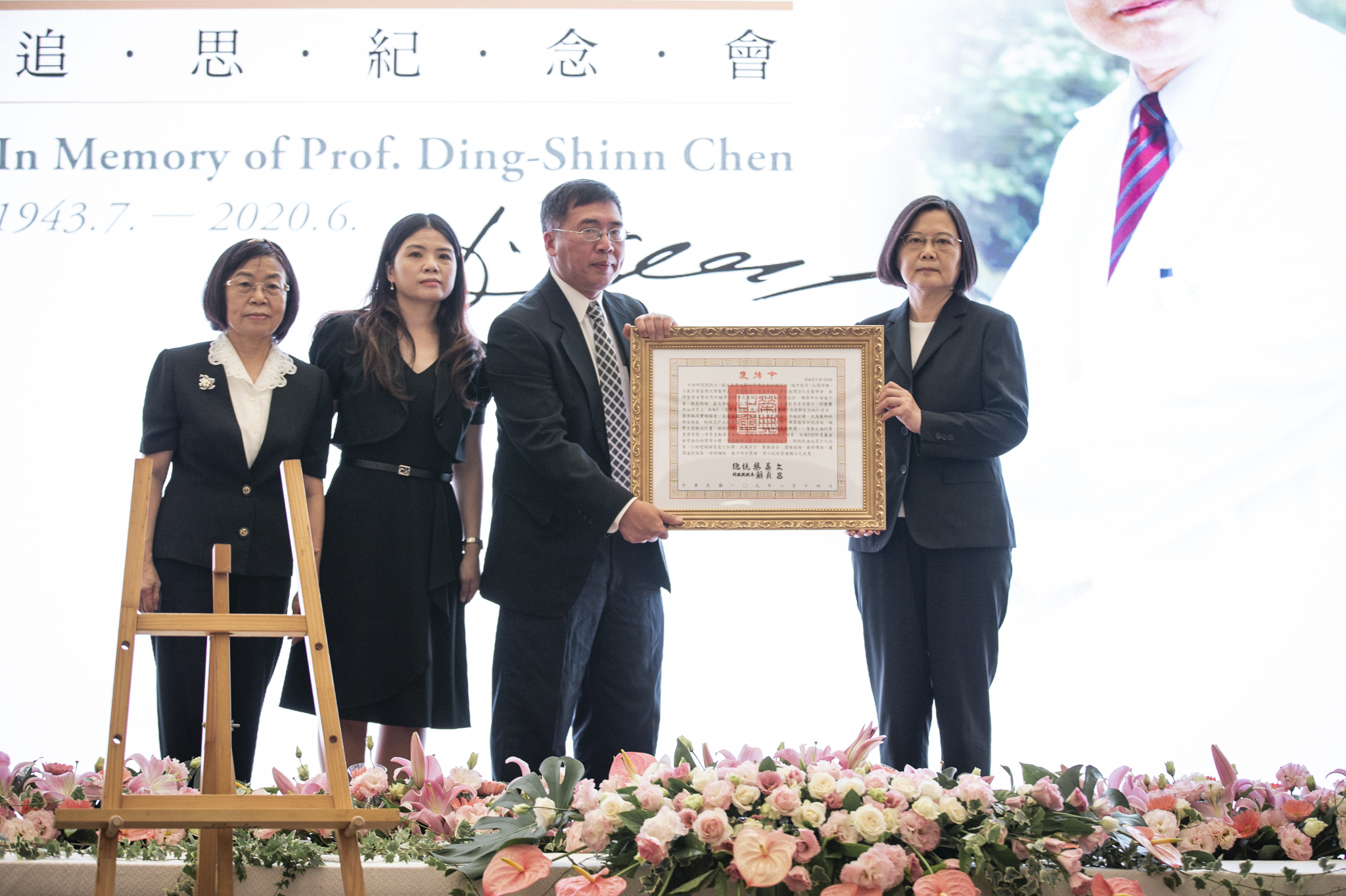 總統抵達會場後，首先頒贈褒揚令，由陳院士之子陳志恆先生代表接受。 總統親頒褒揚令 表彰陳定信院士對臺灣公衛醫療的卓越貢獻 總統偕同副總統出席「中央研究院陳定信院士追思會」 總統褒揚令全文為： 中央研究院院士、國立臺灣大學特聘講座教授陳定信，端方恢奇，洽聞詳雅。少歲卒業臺灣大學醫學系，蓄志攻習，俊名早發。歷任臺灣消化系醫學會、臺灣醫學會暨世界肝臟學會理事長等職，縷析肝病傳染途徑，構築新知濬瀹平臺，振裘持領，窮思畢精。尤以掌執臺大醫學院，厚植軒秀莘莘學子，形塑醫學倫理誓念；推動B、C型肝炎篩檢，悉心專科診治究研；力促新生兒施打疫苗，盡瘁臨床實證探索，長慮遠圖，明見萬里；澤民兼善，卓越前瞻，允為醫師科學家典範。嗣規度肝疾處療指引，協策產業試劑自製；殫籌國家防疫措施，碩擘大型根治計畫，襟抱訏謨，曲突徙薪。曾獲頒總統科學獎、一等衛生福利專業獎章暨二等景星勳章等殊榮，亦獲日本經濟新聞亞洲賞、美國B型肝炎基金會布倫伯格獎等令譽，潛德勳華，望尊海宇。綜其生平，陶鈞啟迪成育才之功業，仁術懋績揚惠愛之弘聲，流風芳烈，秉操清芬；遺緒遐福，垂世傳詠。遽聞溘然殂落，悼惜彌殷，應予明令褒揚，用示政府崇禮國士之至意。